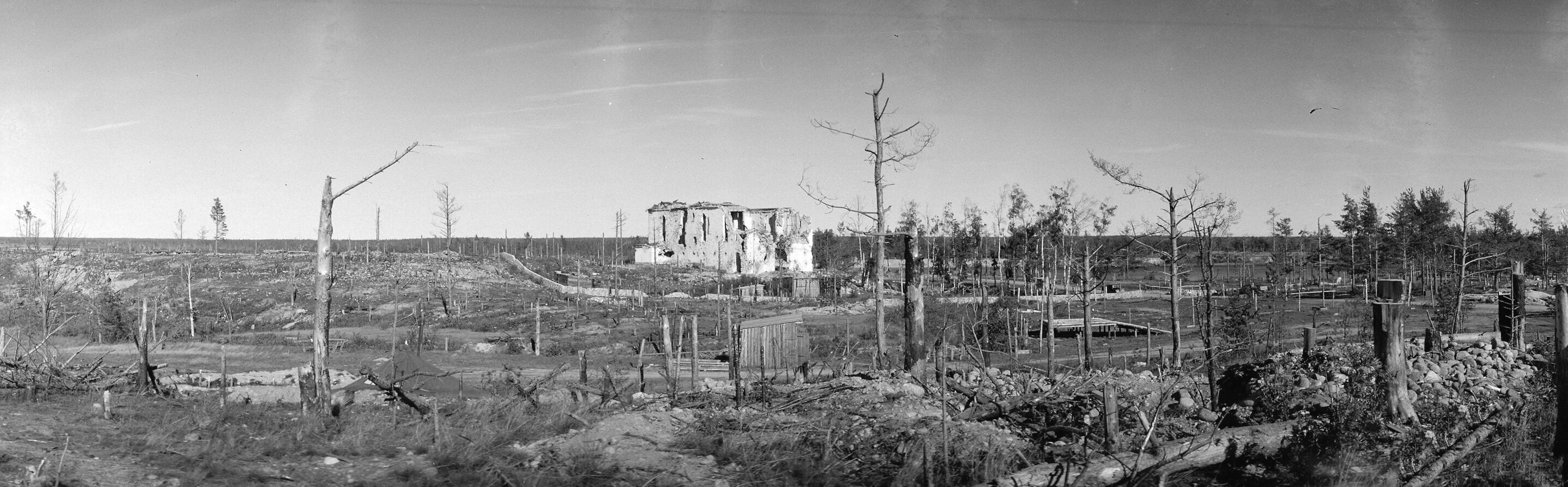 Äyräpään kirkko, oikealla maantie. Äyräpää 1941.09.17